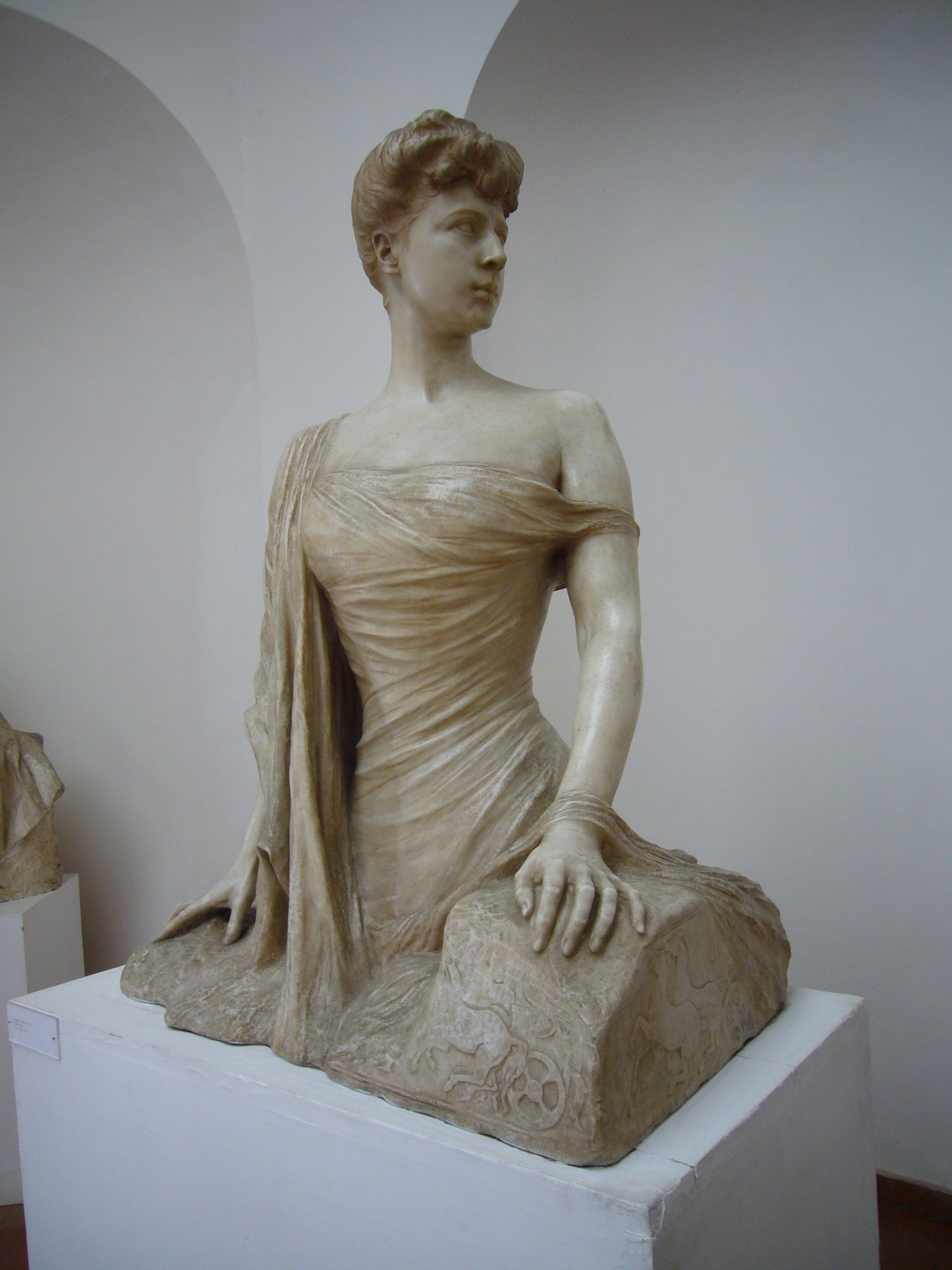 Roma, Museo Canonica, ritratto di donna Franca Florio (Pietro Canonica 1900-1905)